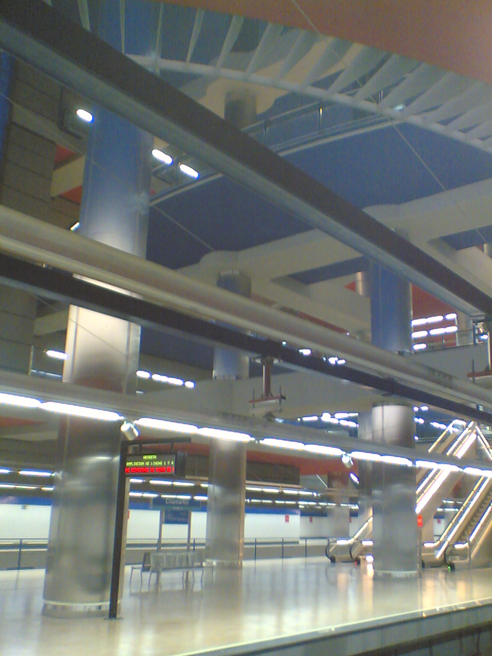 Imagen del patio vertical de la estacion de metro de Chamartín en Madrid